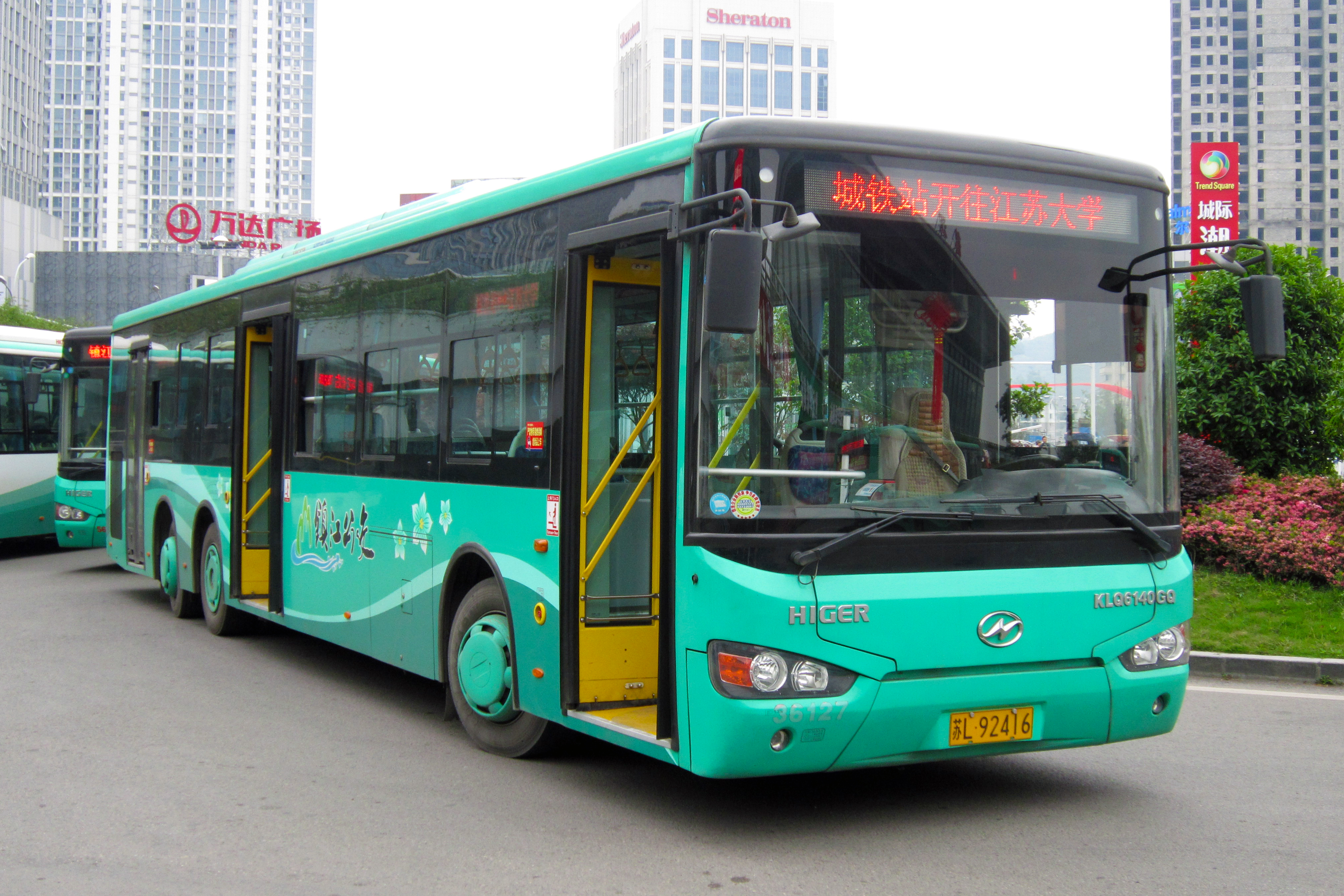 Zhenjiang Bus D1 | Higer | KLQ6140GQ (Low Entrance) | HuangShan Road(West) 鎮江公交D1路 | 蘇州金龍海格客車 | KLQ6140GQ （低入口） | 黃山西路 鎮江站南廣場